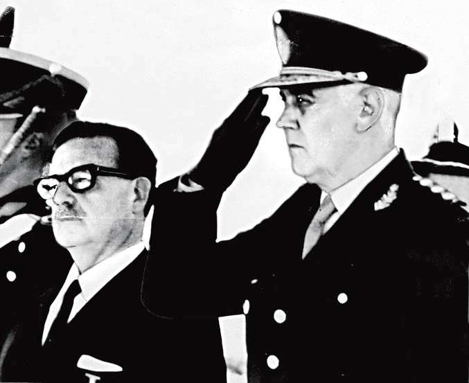 Encuentro en julio de 1971 entre los Presidentes Alejandro Lanusse de Argentina y Salvador Allende de Chile. Salta, Argentina.